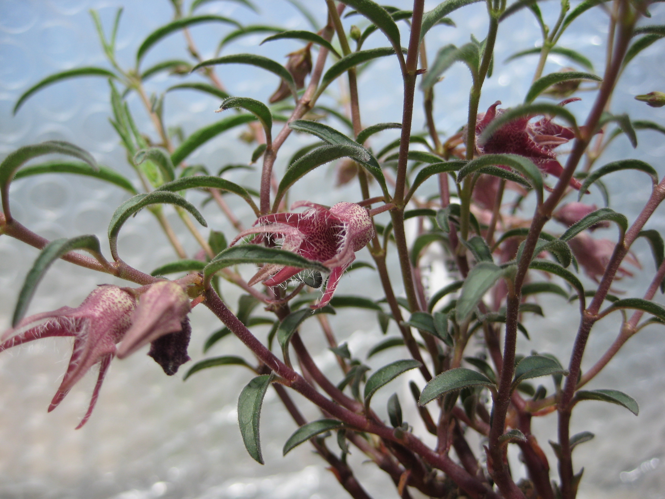 Brachystelma tuberosum in Kultur